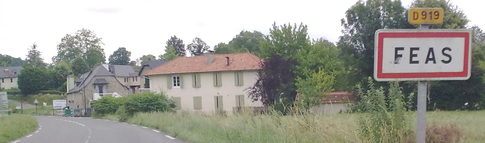 Féas le 4 juillet 2010.